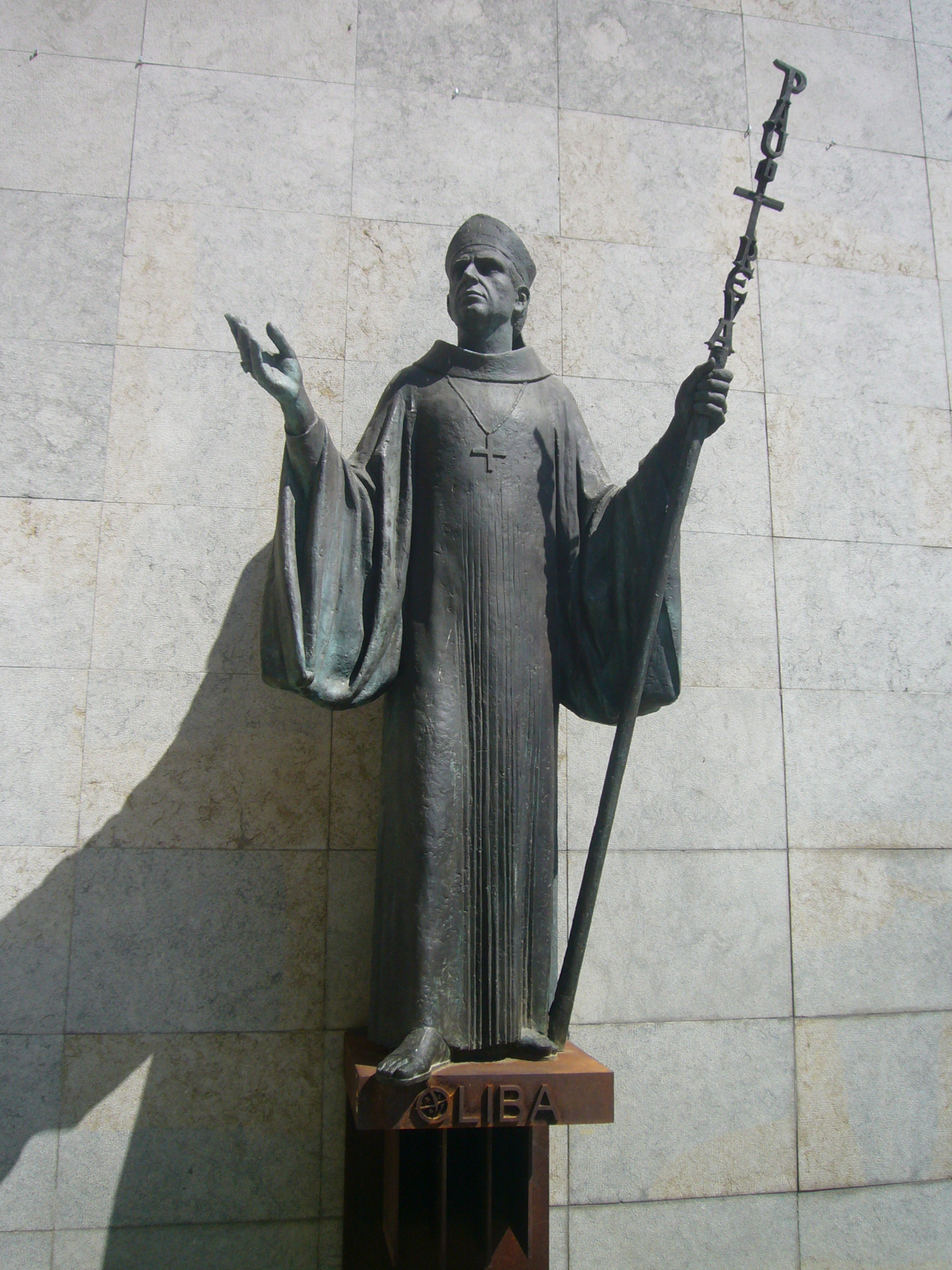 Escultura de l'Abat Oliba situada davant la portalada del monestir de Ripoll, obra de Francesc Fajula i Pellicer